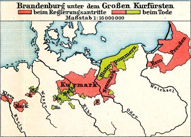 Brandenburg-Preußen von 1640 (rot) und 1688 (rot und grün) aus: Putzgers Historischer Schul-Atlas, 1905